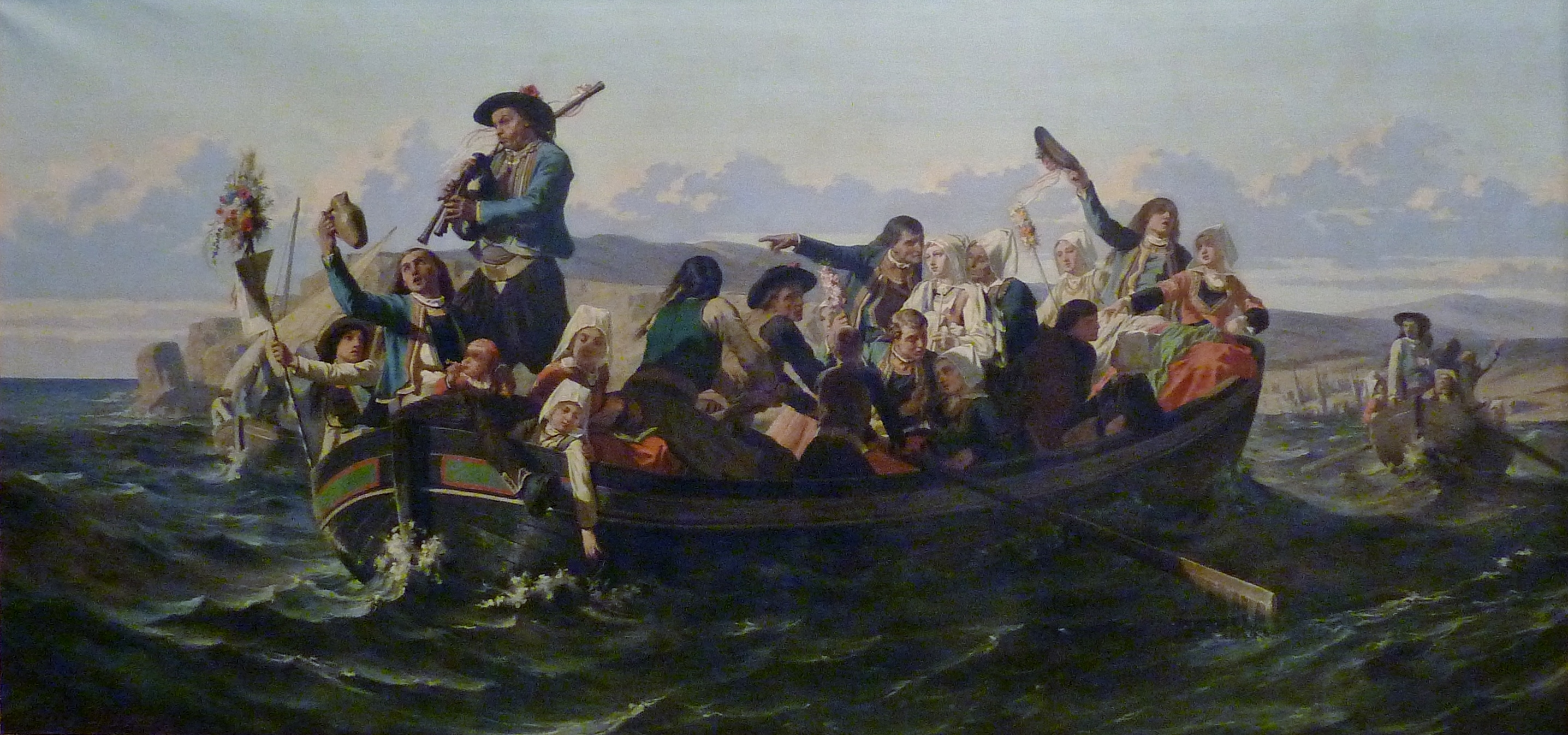 Louis Duveau : Retour du pardon de Sainte-Anne-la-Palud (1859) [Les pèlerins reviennent en bateau à Douarnenez en traversant la baie, de retour du Grand pardon de Sainte-Anne-la-Palud. Chacun ramène des souvenirs de la fête : bouquets, rubans, images pieuses. Le Menez Hom est visible à l'arrière-plan] (Musée des Beaux-Arts de Quimper).